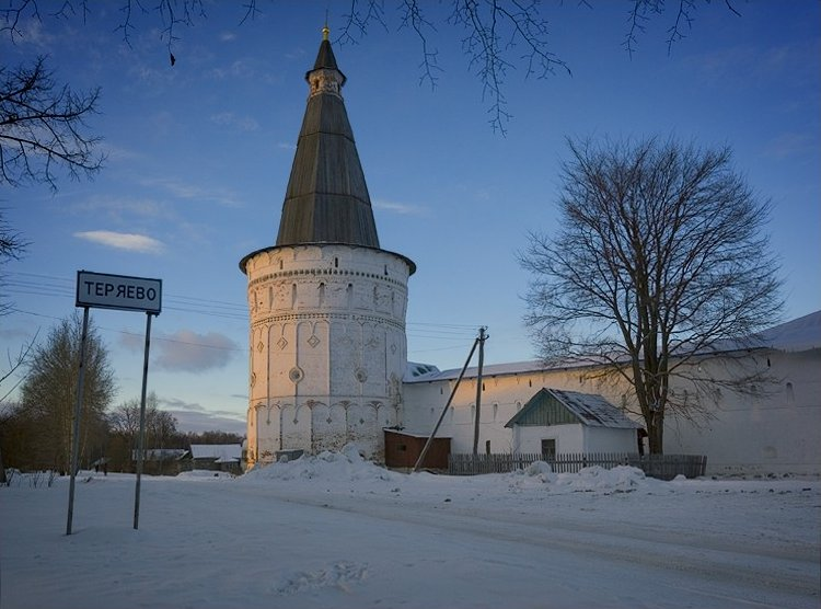 Теряево